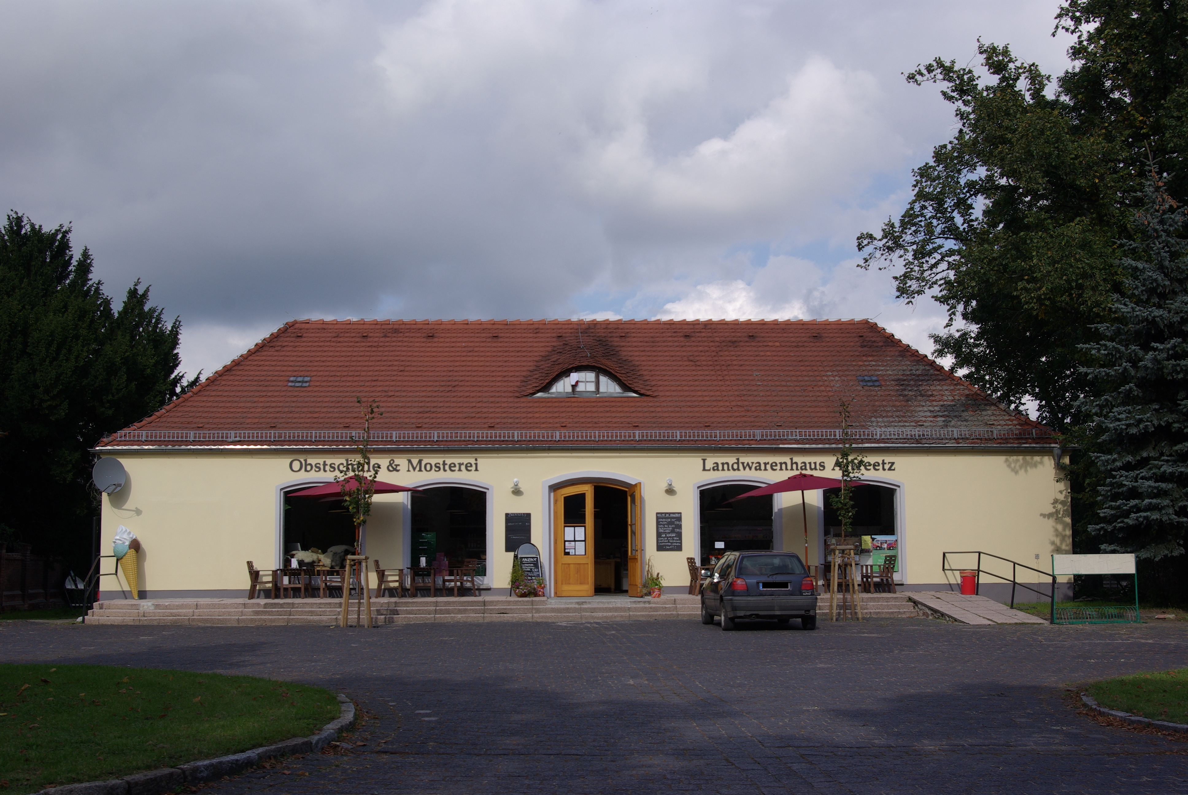 Oderaue in Brandenburg. Das Haus für den Landwarenhandel wurde im Jahre 1955/1956 errichtet.